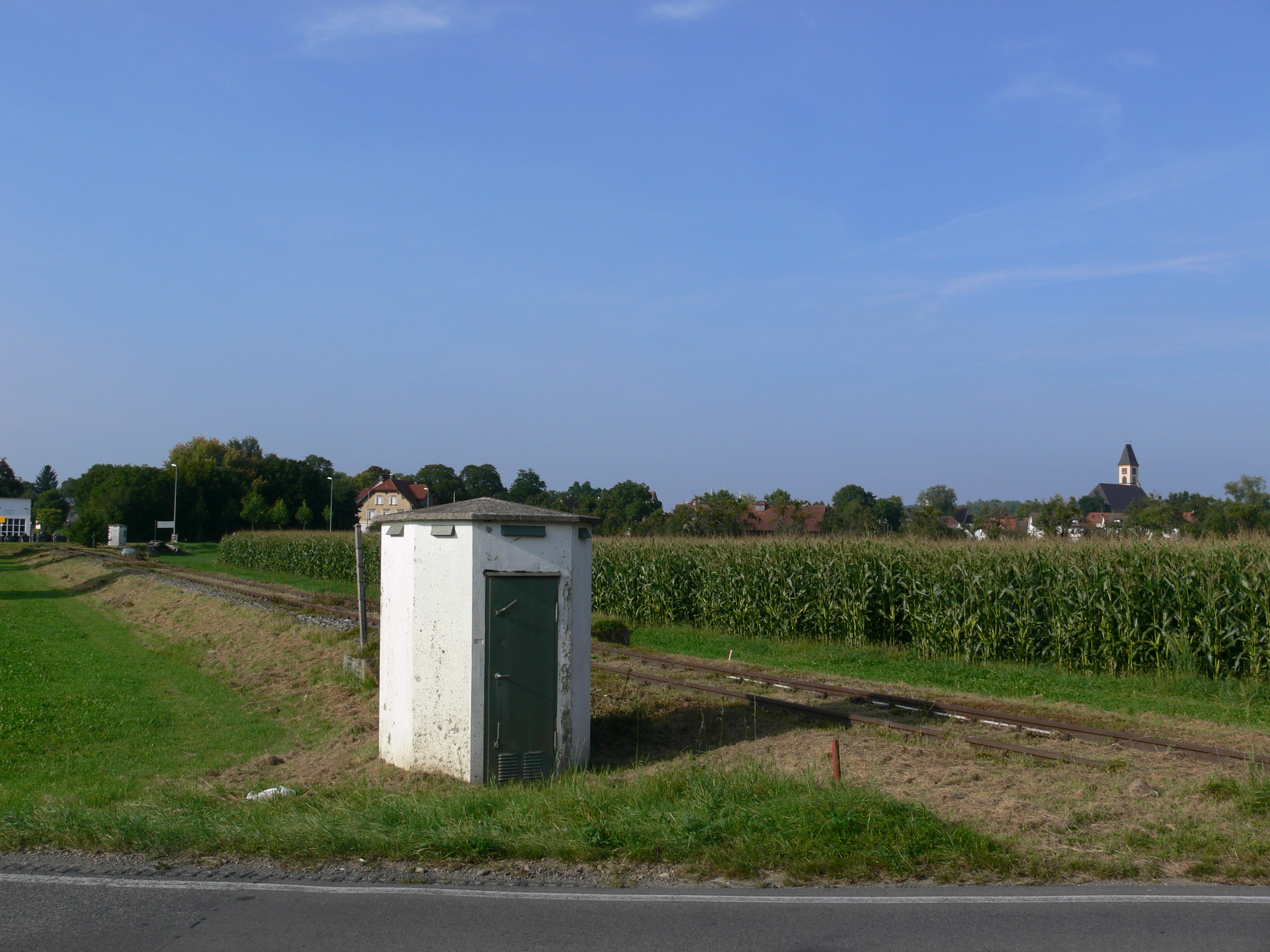 Gleise der ehemaligen Nebenbahn Niederbiegen–Weingarten Baienfurt, östlich der früheren Bundesstraße, Blick in Fahrtrichtung Niederbiegen (ca. Km 3,05 der Nebenbahn Niederbiegen-Baienfurt, am Beginn des Dreischienengleises)